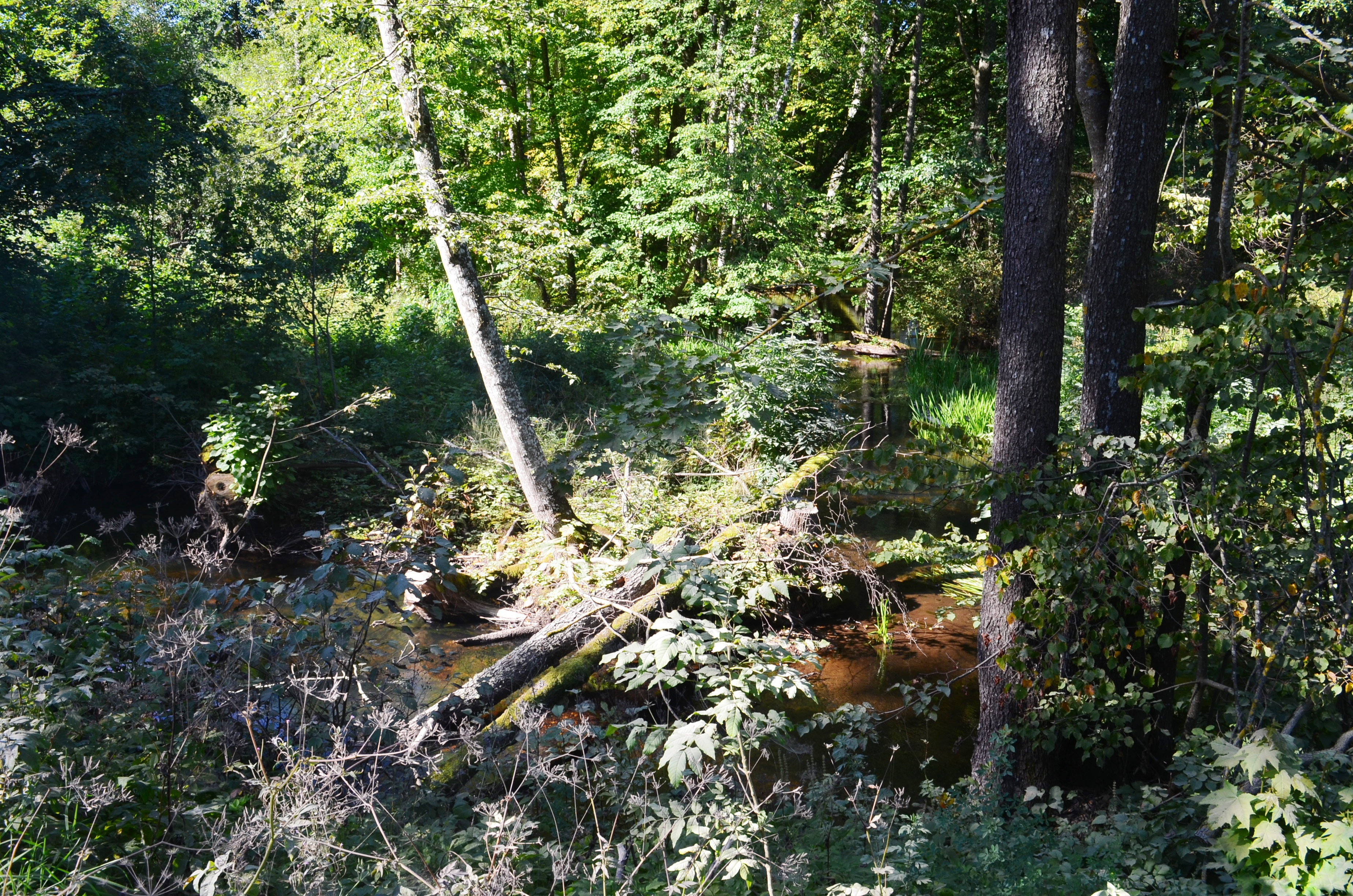 Zalvė (Pazalvė) į vakarus nuo Dūburio ež., Zarasų raj.